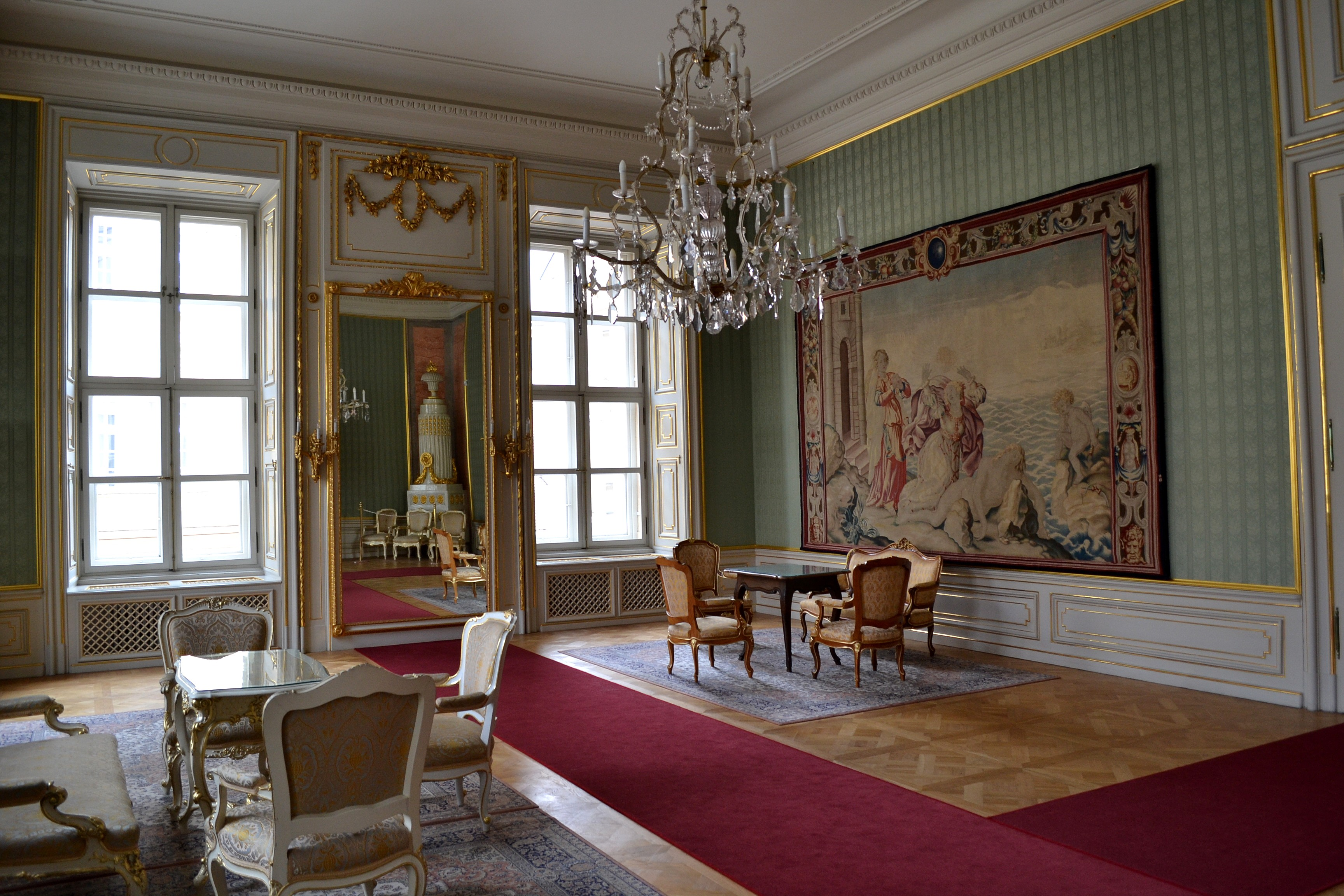 Pohľad do interiéru Primaciálneho paláca